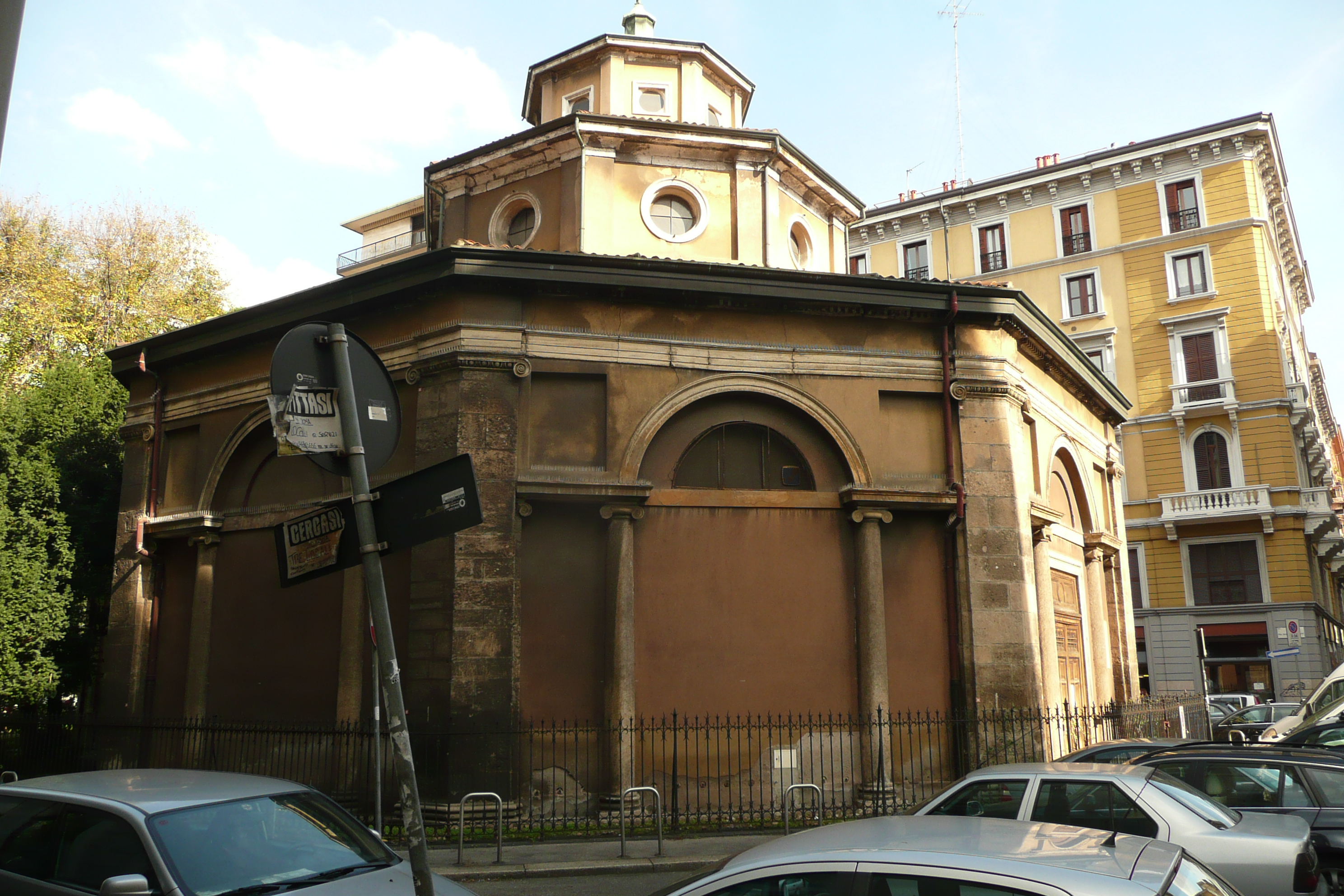 uno degli otto lati costituiti da una serliana, oggi murati